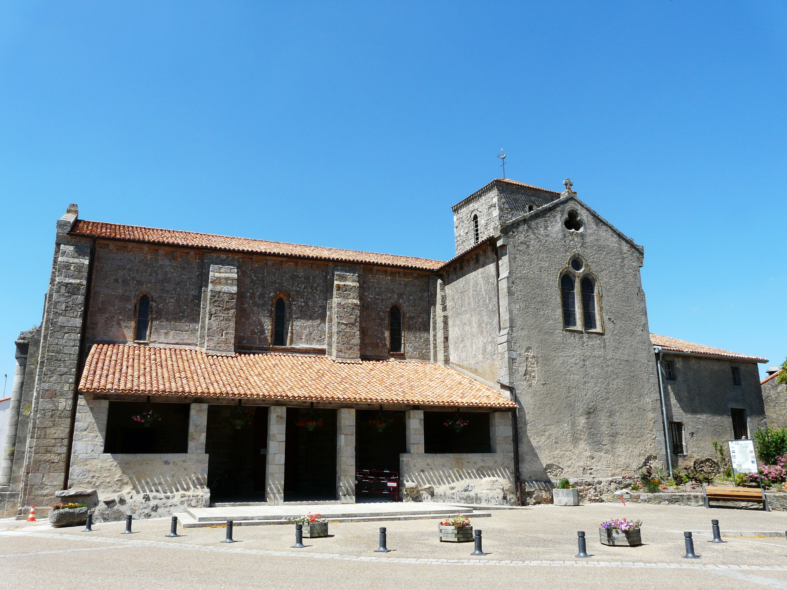 L'église Saint-Hilaire de Gourgé, Deux-Sèvres, France